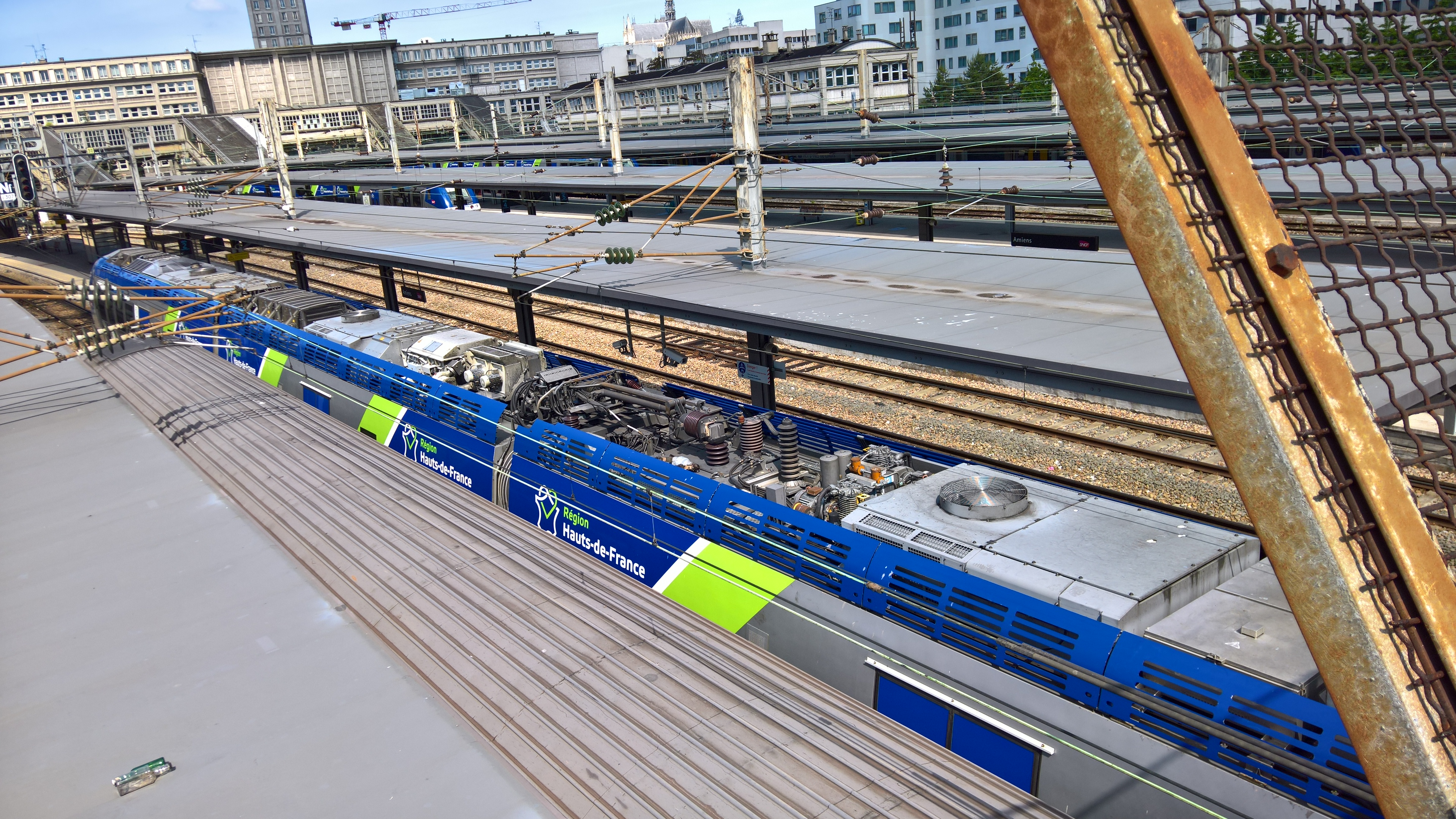 Toiture de la rame B 82605 SNCF en gare d'Amiens, vue depuis la passerelle de la rue Riollan